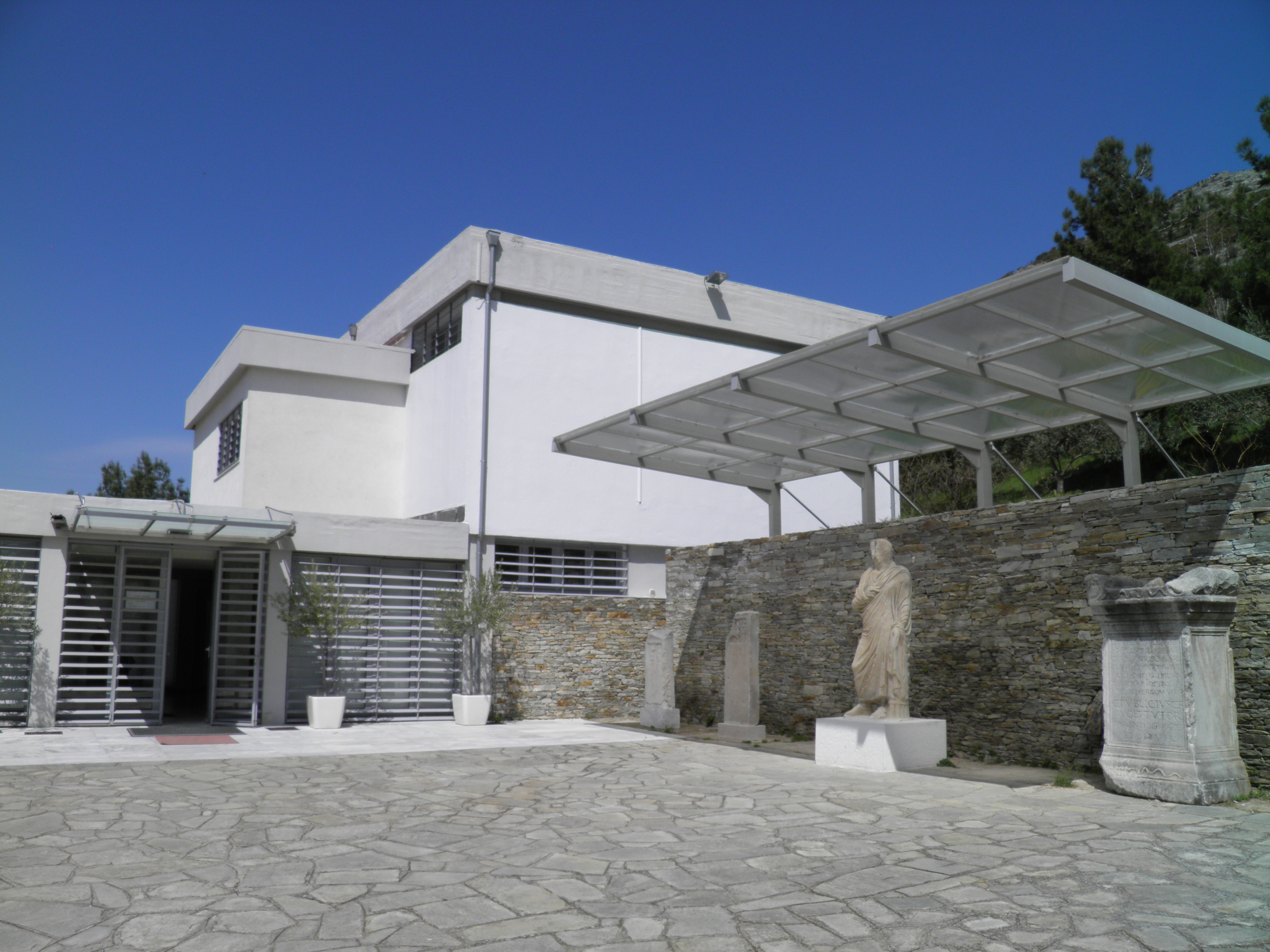 Philippi Museum